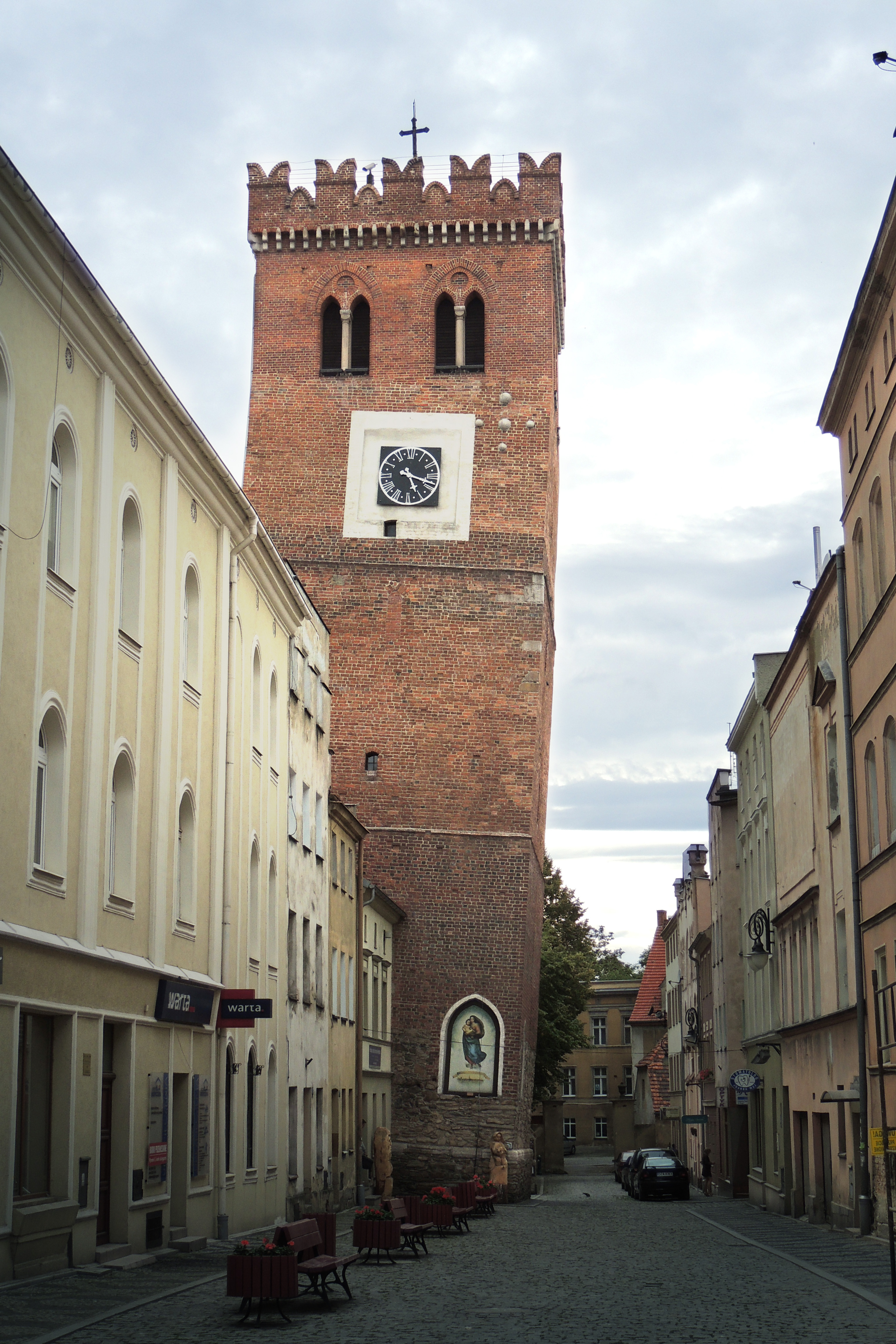 Ząbkowice Śląskie, dzwonnica, tzw. Krzywa Wieża, XV, XVII